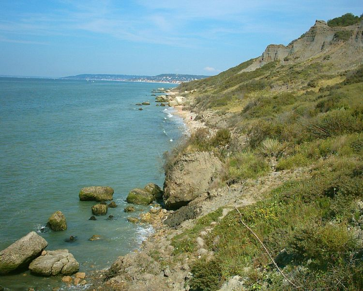 Falaises des Vaches Noires, Houlgate in summer 2004.